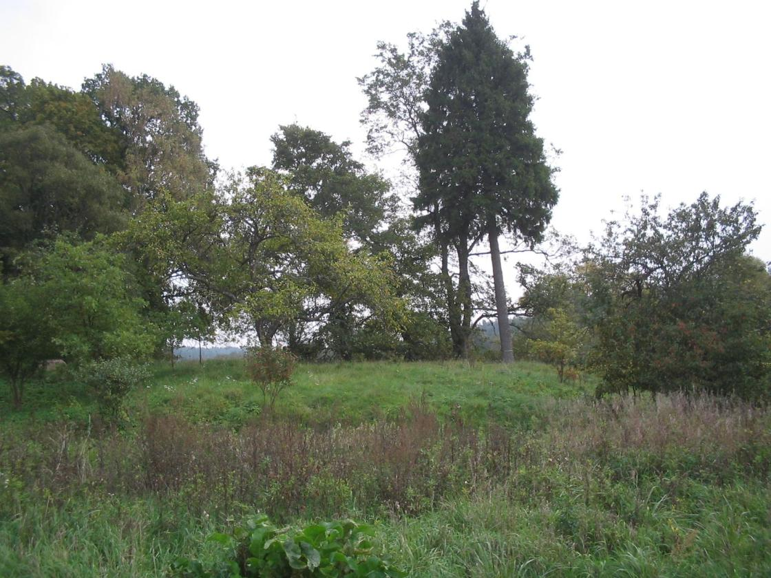 Pocių kapinės